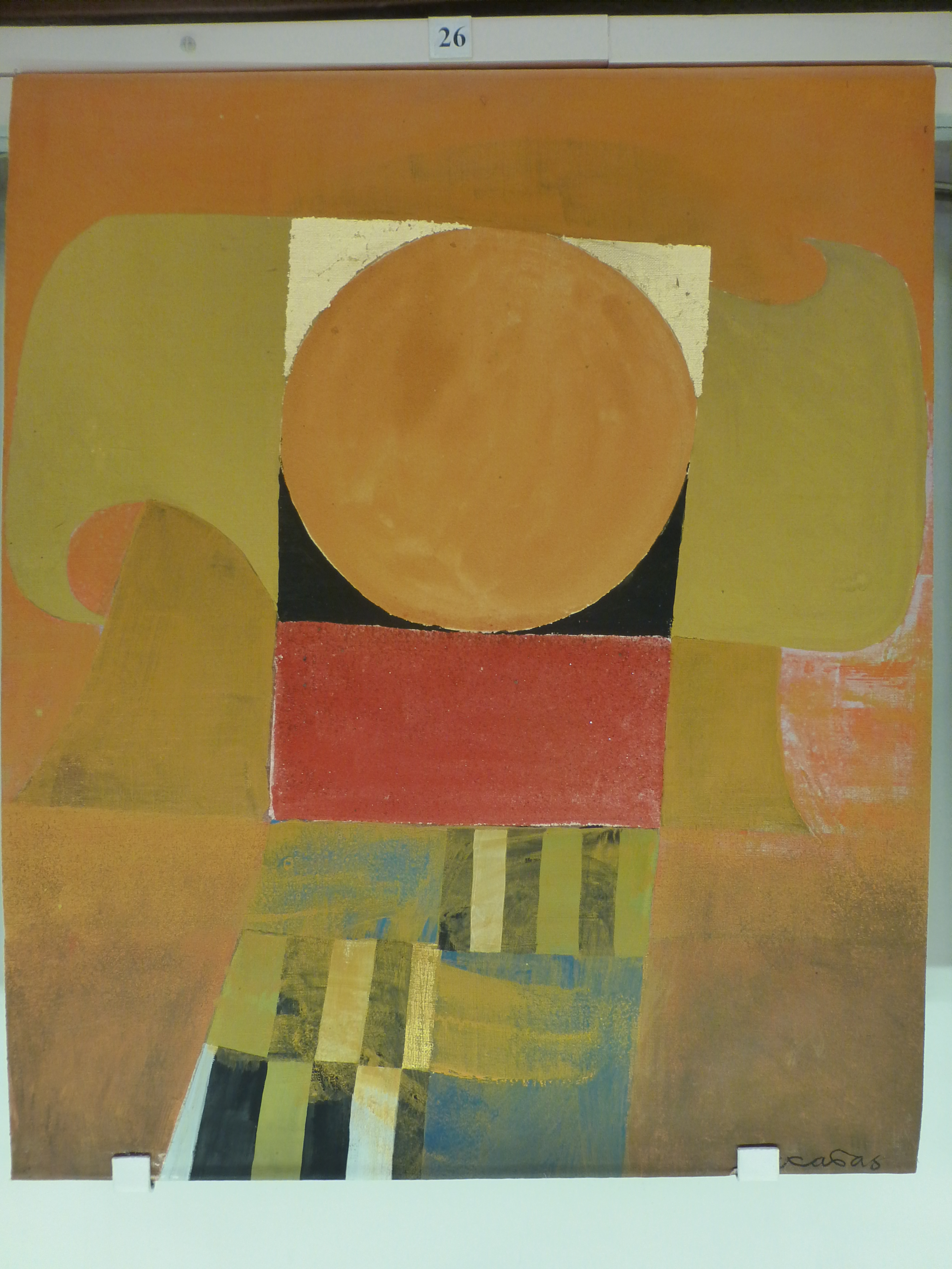 Trône de la Sagesse, 1985 (à l'église de Saint-Hugues-de-Chartreuse)